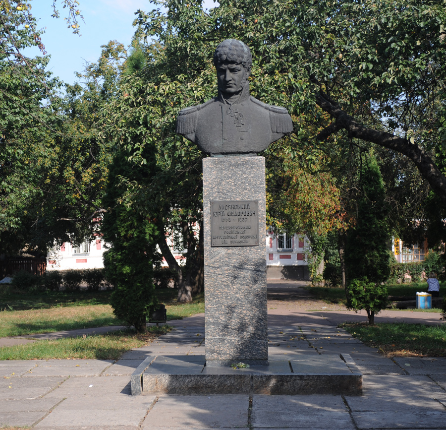 Знаменитый путешественник и первооткрыватель Лисянский